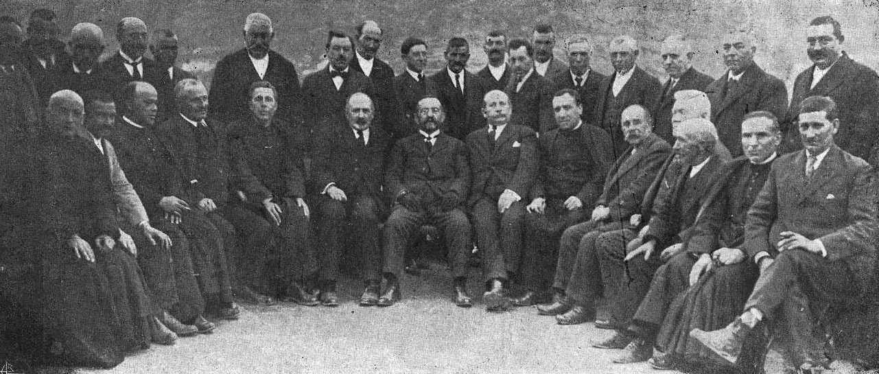 José Estévez Carrera cos seus amigos en Leiro, fotografía en Vida Gallega 1924